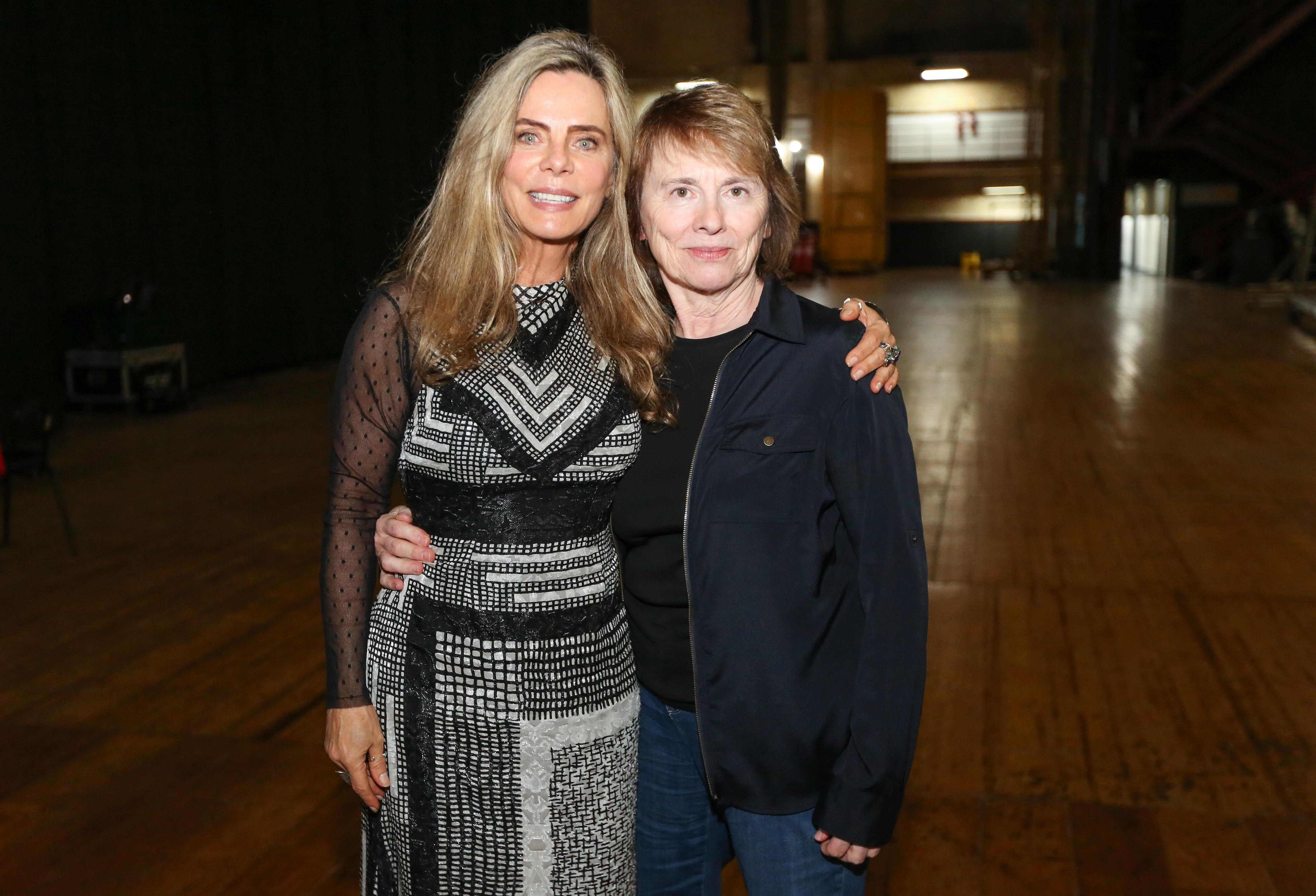 Convidada: Camille Paglia, crítica cultural norte-americana. Data: 15 de agosto de 2017 Local: Teatro Castro Alves - Salvador Crédito das imagens: Vaner Casaes / Ag. BAPRESS